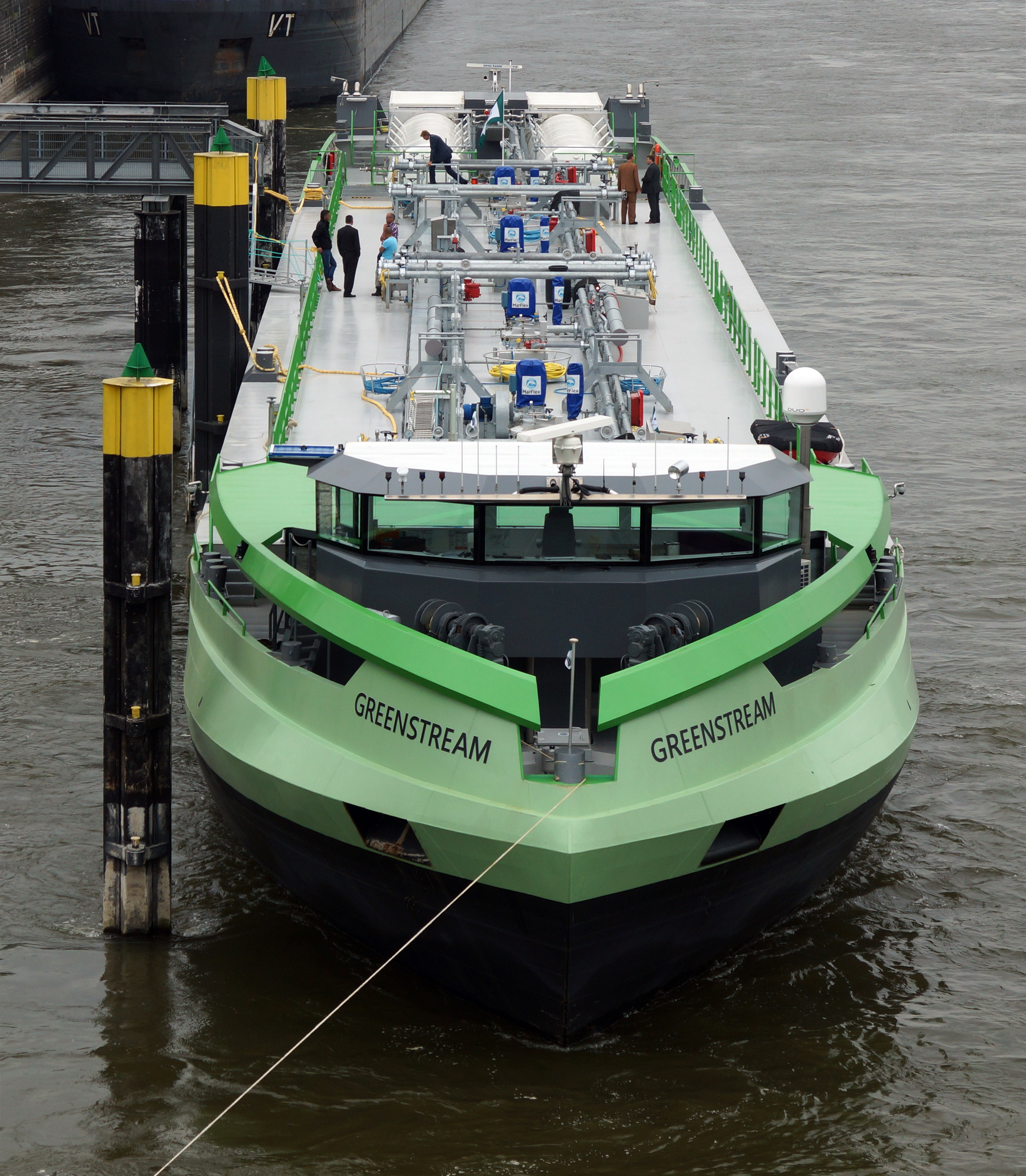 Das mit Flüssigerdgas angetriebene Tankmotorschiff Greenstream am Anleger unterhalb der Kölner Südbrücke am südlichenen Ende des Rheinauhafens.